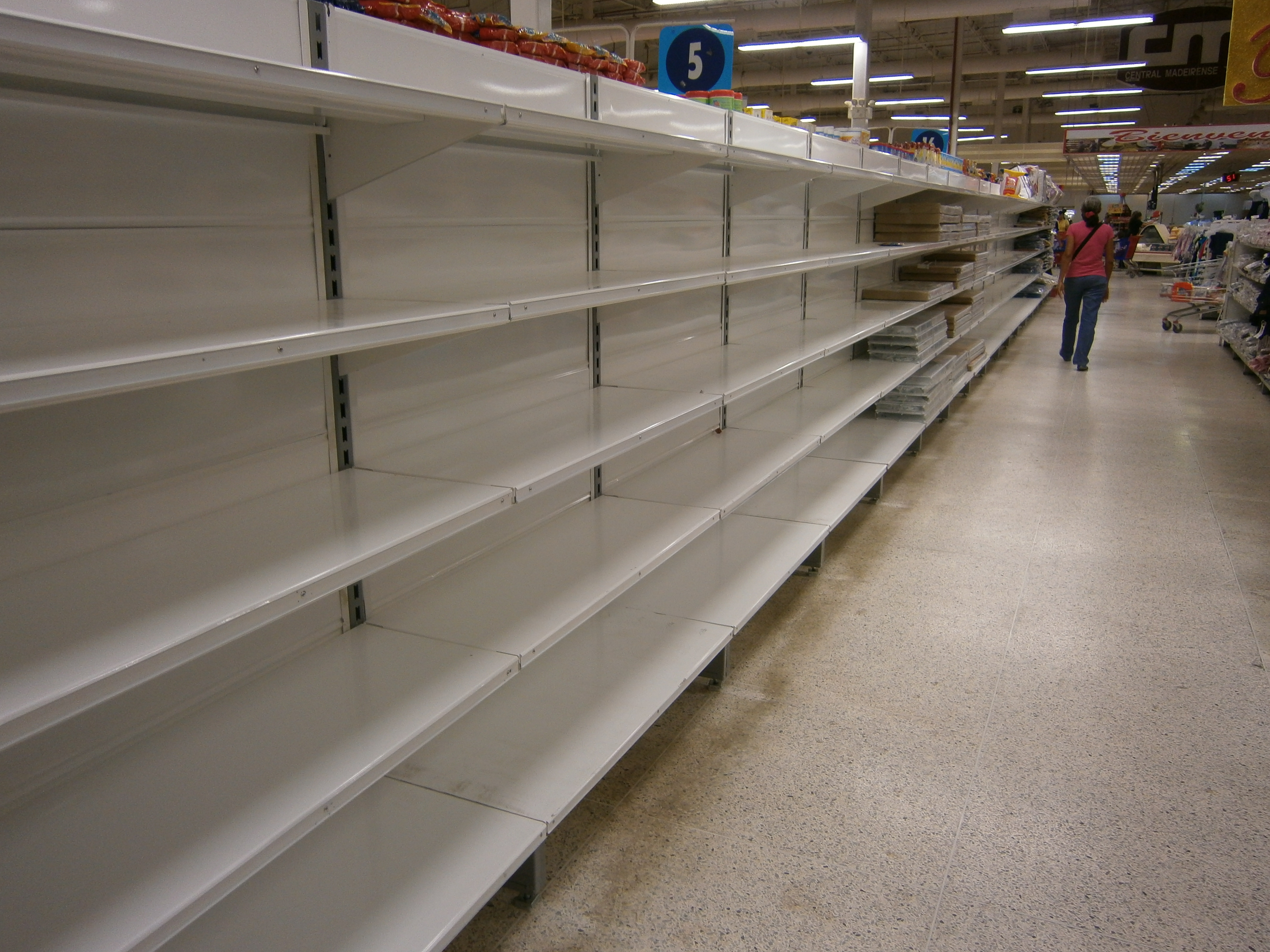 Escasez en Venezuela, Central Madeirense